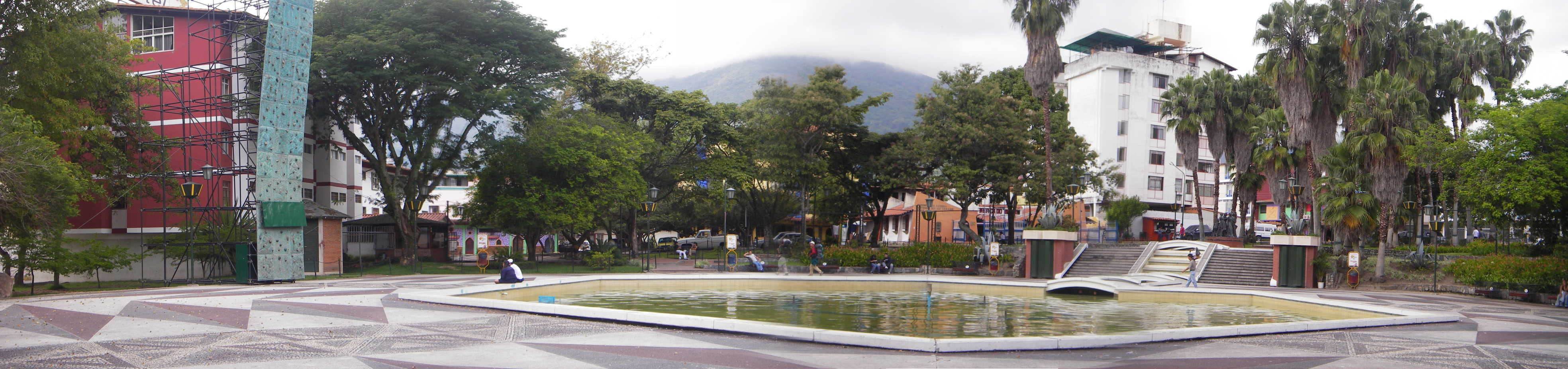 Imagen panorámica de la plaza Las Heroinas en Mérida, Venezuela. La imagen denota la fuente central y la arborización de la misma, en la parte derecha, se puede apreciar la fuente menor con las estatuas de las heroinas merideñas .Licencia Libre, imagen tomada por Jorge Paparoni, favor nombrar fotógrafo y fuente para enlaces externos.